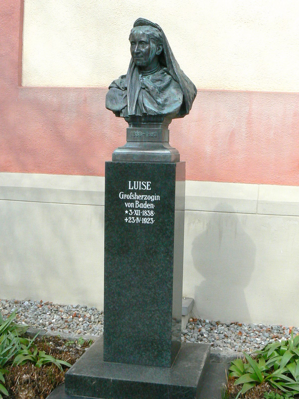 Statue Luise Großherzogin von Baden auf der Insel Mainau